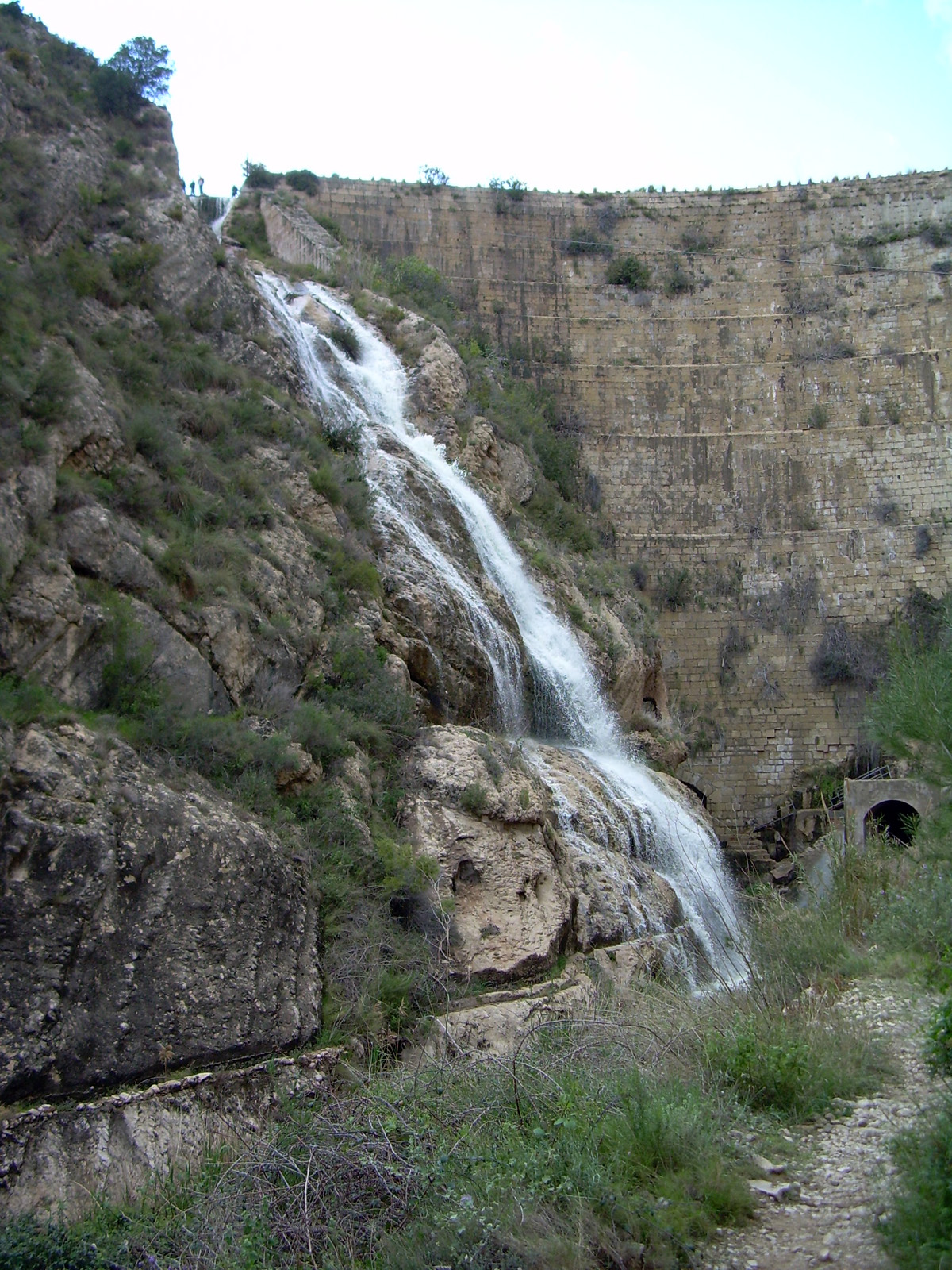 Presa del pantà de Tibi (Alcoià)